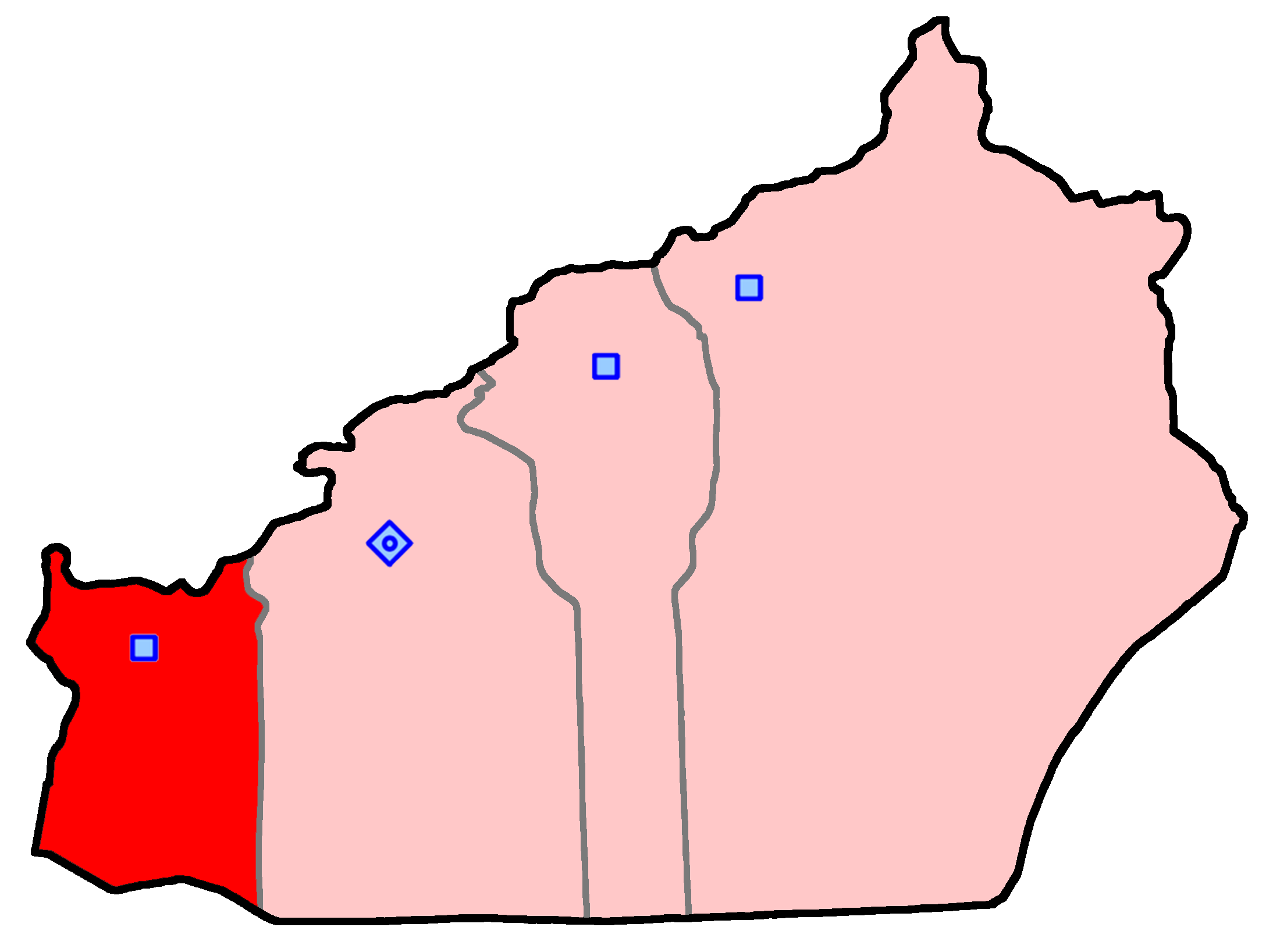 =حوزهٔ انتخاباتی گرمسار برای انتخابات مجلس شورای اسلامی